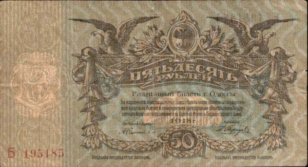 Одесские деньги - 50 рублей, аверс. 1918. Цвет естественный